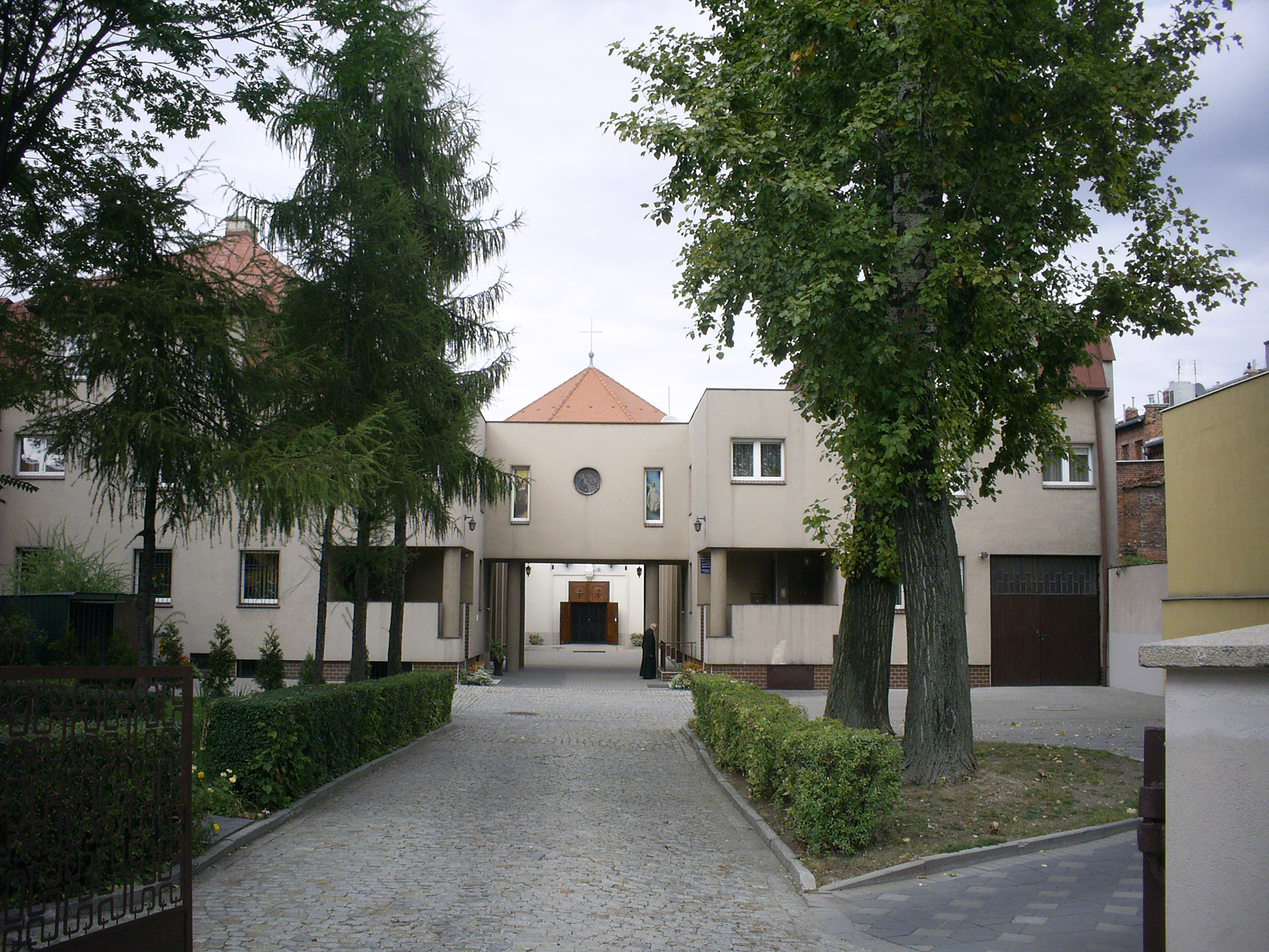 Kościół par. p.w. św. Józefa Robotnika W granicach murów obwodowych. Na działce geodezyjnej Nr 10, AM-20, obręb 0022 Południe Krakowska 46, Miasto Wrocław - Krzyki